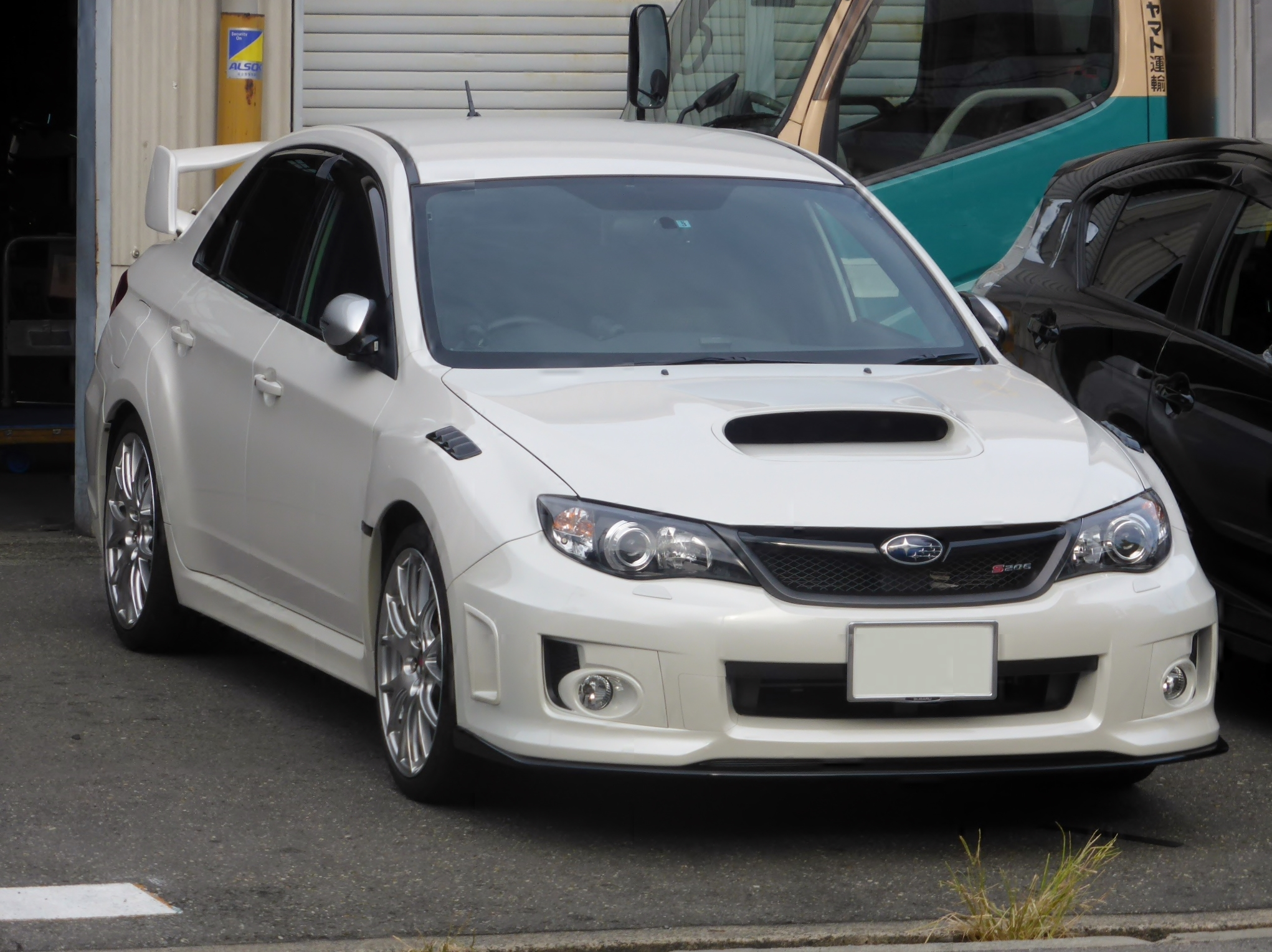 GVB型スバル・WRX STI S206（オプションのリアウィング付属）をフロントから撮影。